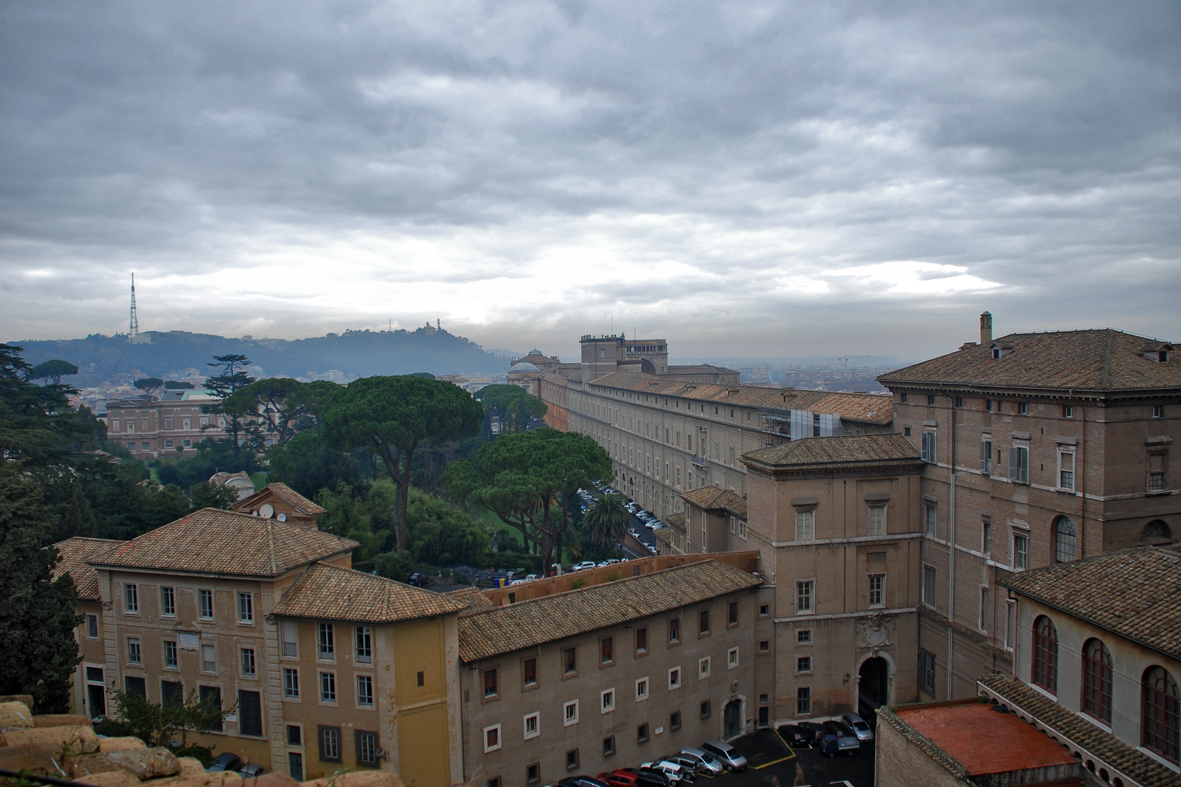 Ватикан